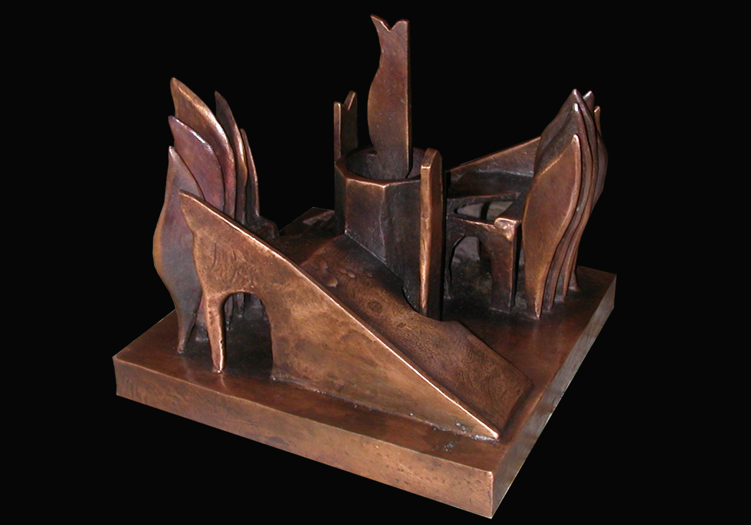 Scultura in Bronzo Opera di Oreste Ruggiero